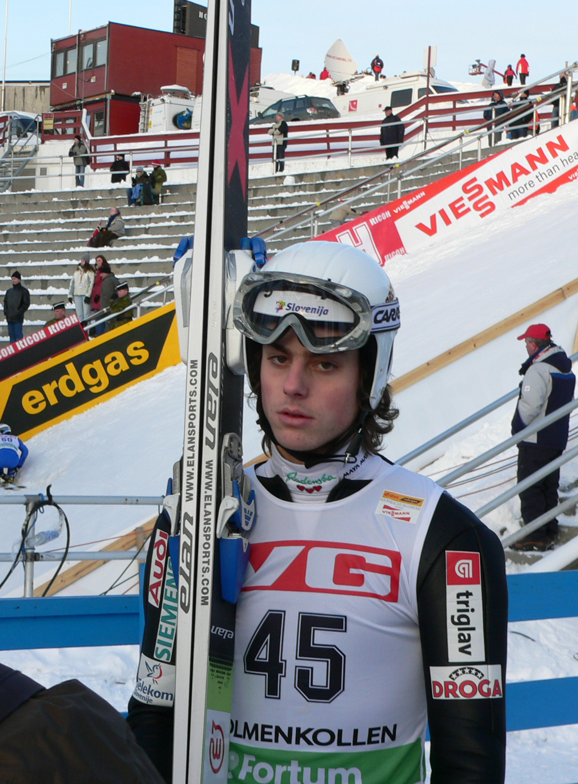 Rok Benkovič at the WC event in holmenkollen in 2005.